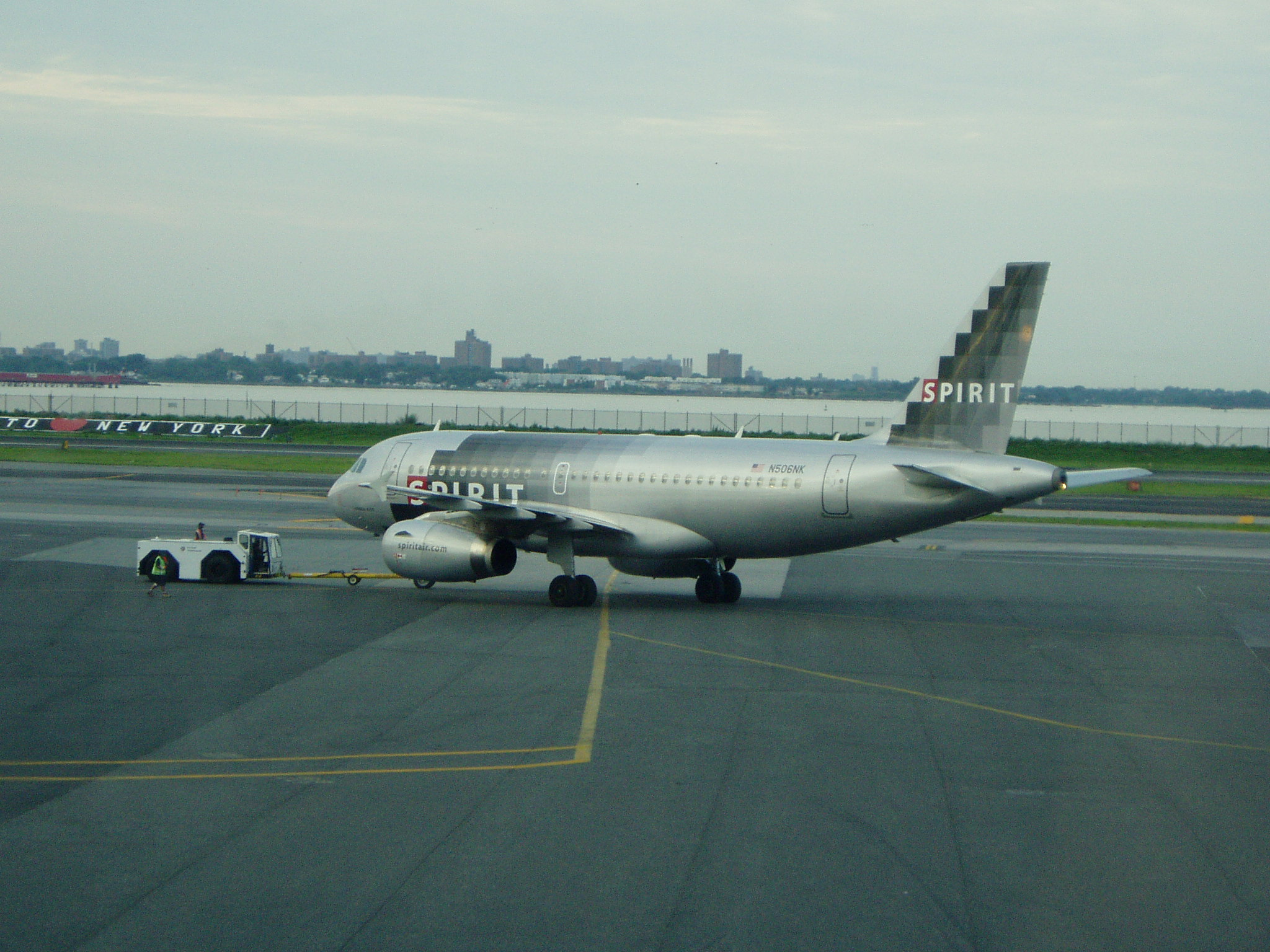 Spirit Airlines Airbus 319-132 N506NK